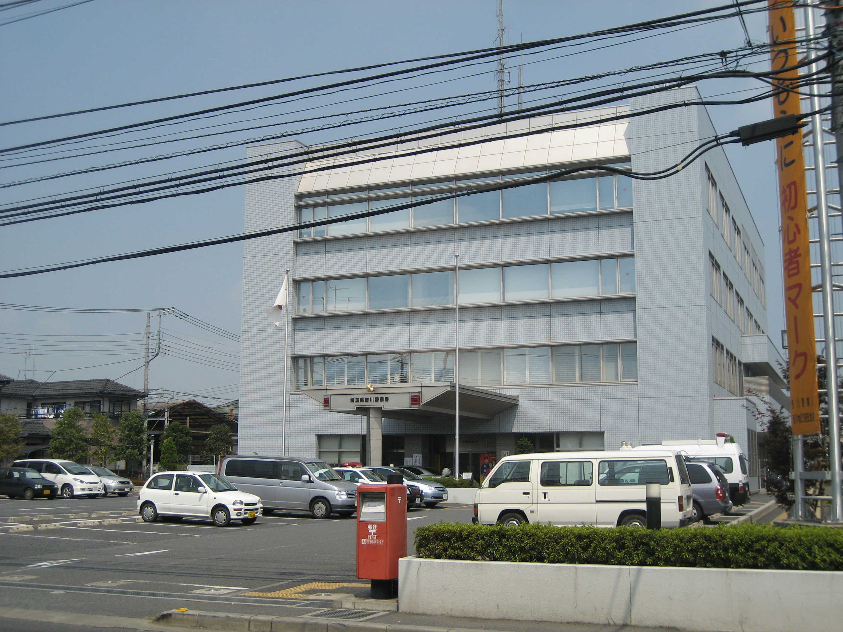 吉川警察署